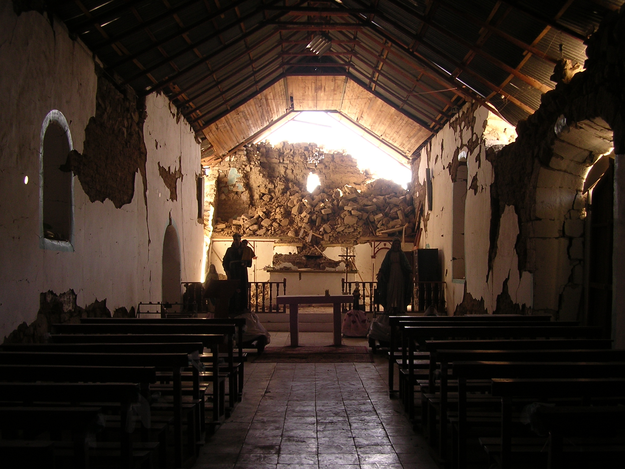 Capilla de Mocha, en la comuna de Huara. Altar en el interior del templo